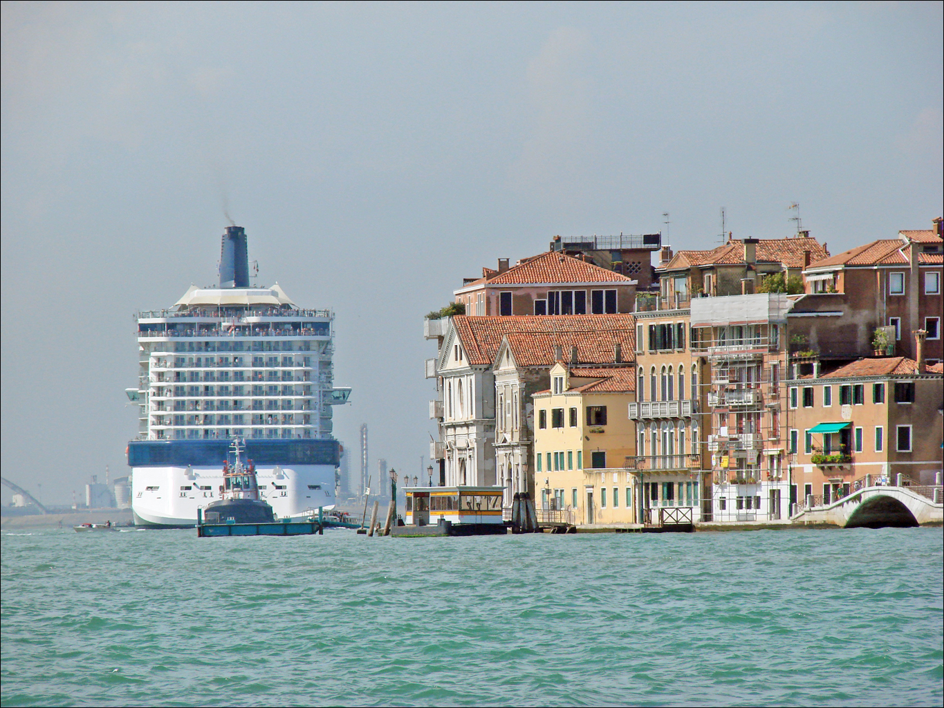 Plusieurs navires de croisière et paquebots empruntent chaque jour le canal de la Giudecca (Photo Annie Dalbéra) Ces HLM des mers sont plus hauts que le campanile de la place Saint-Marc et choquent par leur gigantisme dans un lieu comme Venise aussi chargé d'histoire. Selon les Vénitiens eux-mêmes, le nombre de très gros navires a fortement augmenté ces dernières années, probablement pour des raisons de rentabilité du port de Venise et d'accroissement du nombre de touristes qu'ils génèrent durant un jour ou deux (la taxe de séjour a récemment été augmentée pour atteindre 4 euros par jour)